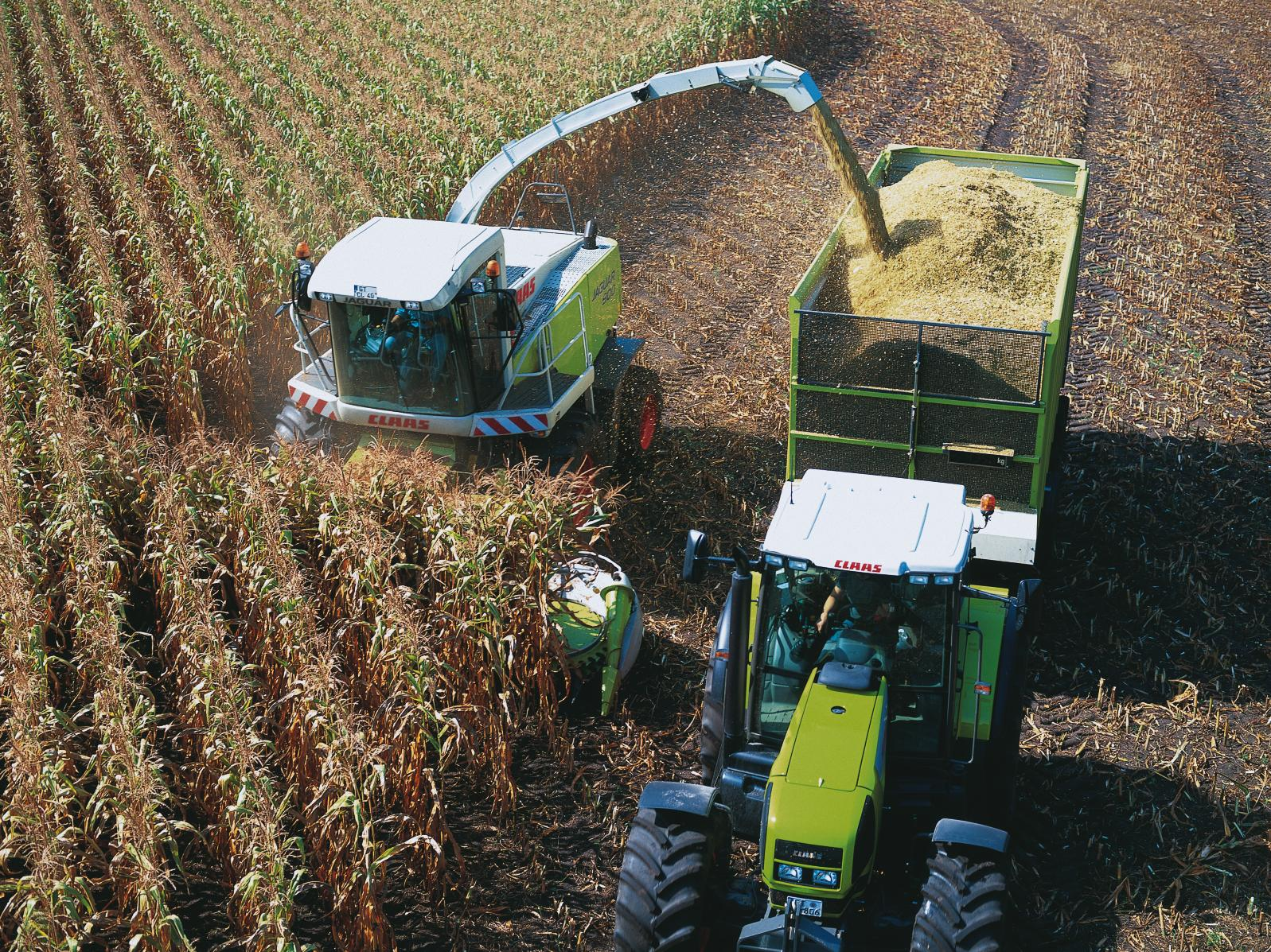 Claas-Feldhäcksler Jaguar 900 bei der Mais-Ernte